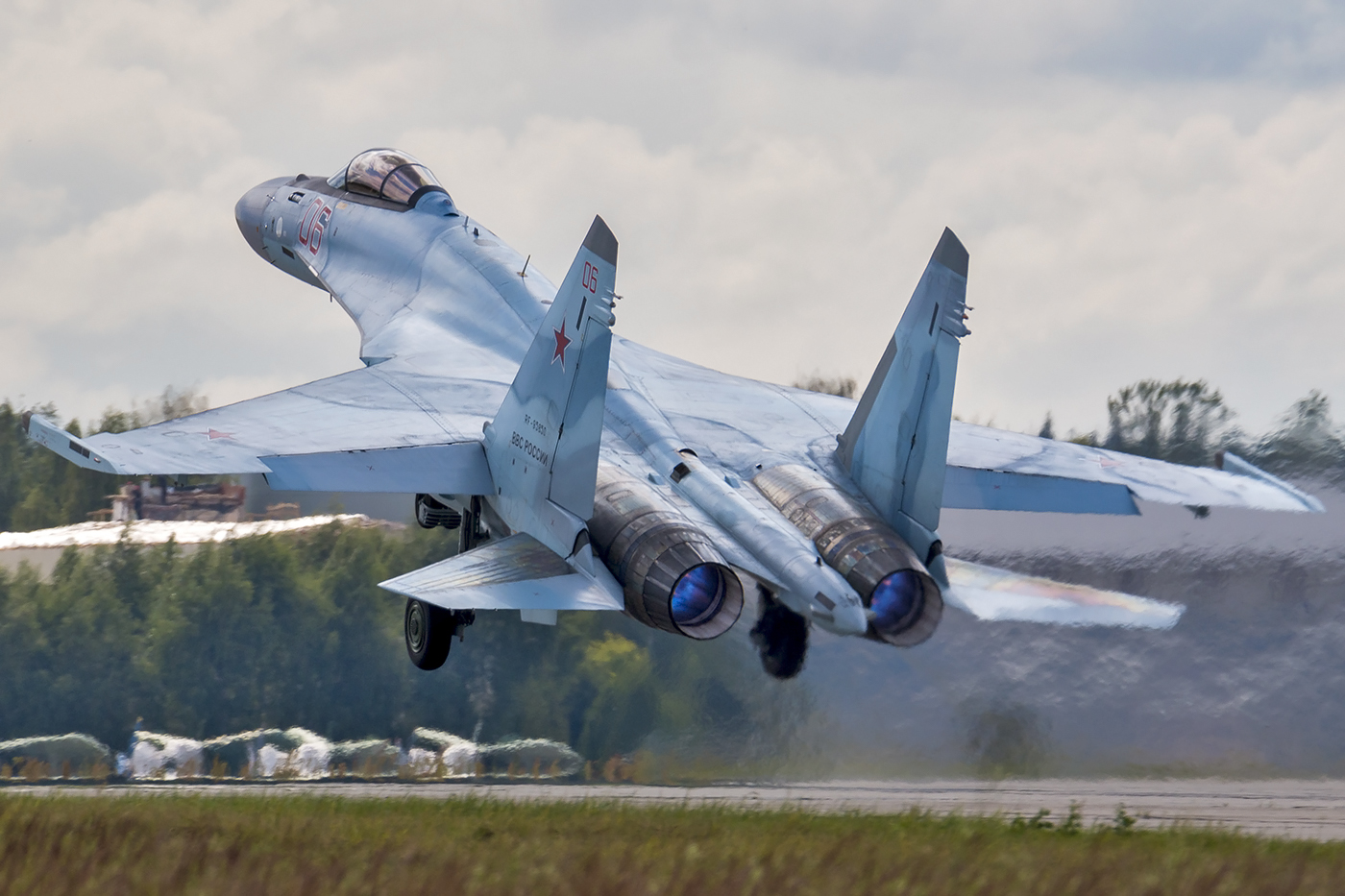 Sukhoi Su-35S